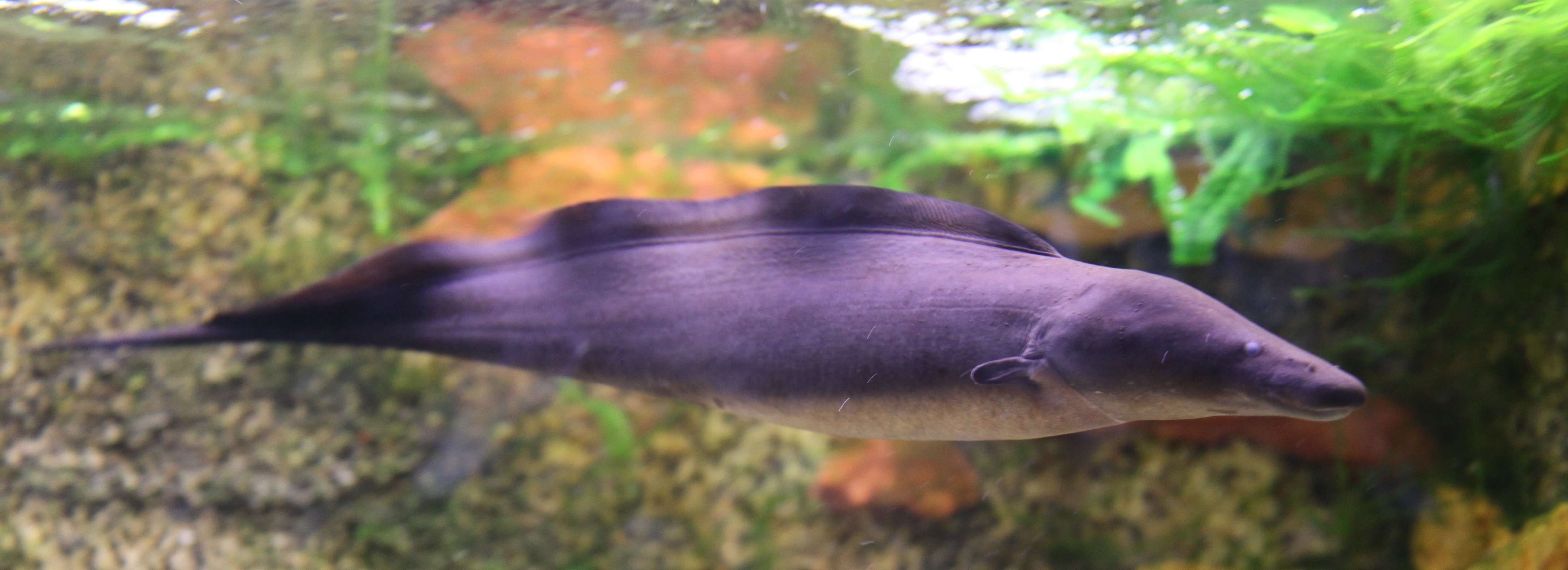 Gymnarque du Nil à l'aquarium tropical de la porte dorée à Paris.